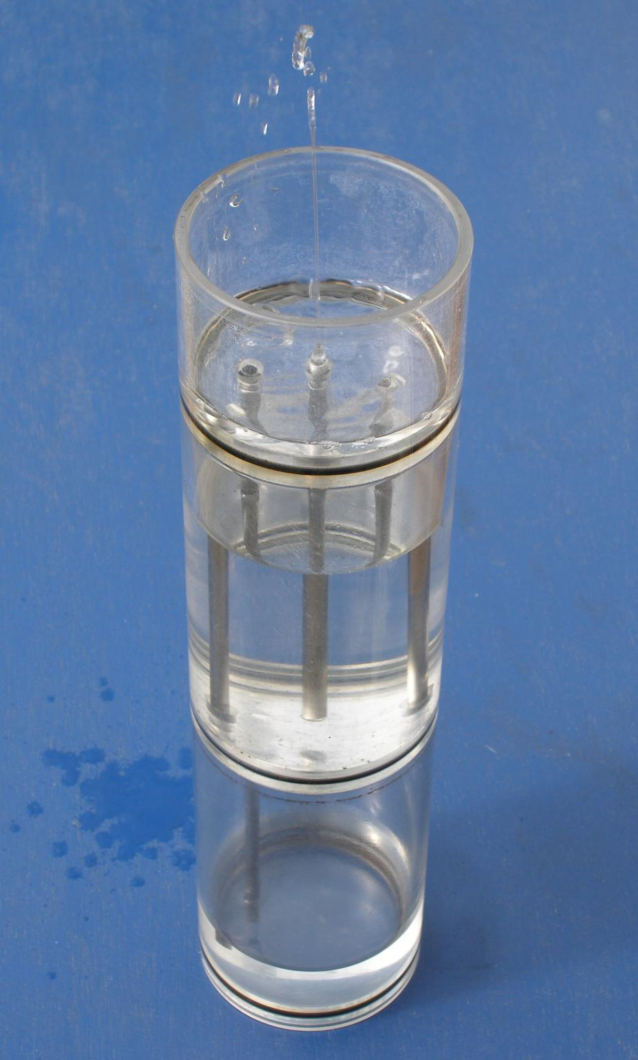 Heronsbrunnen